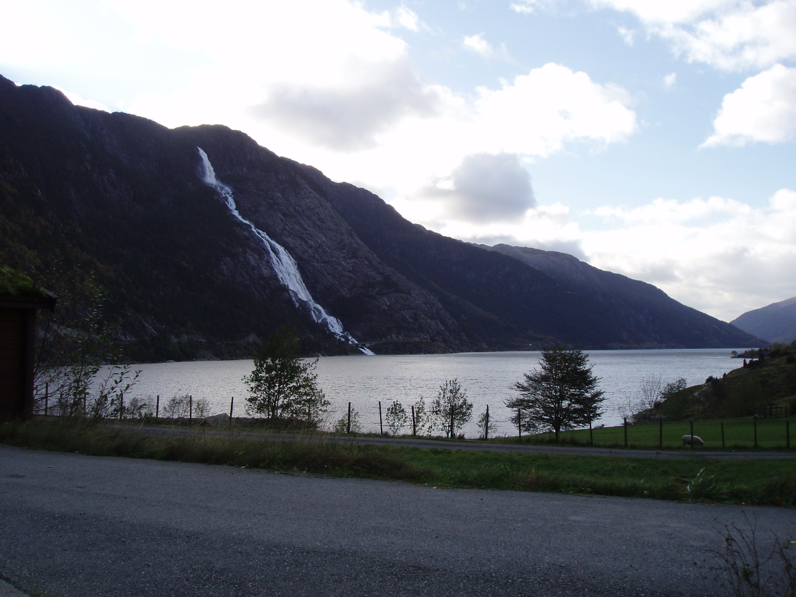 Langfossen in Åkrafjorden